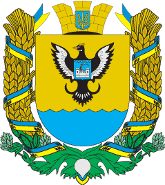 Герб Чуднівського району